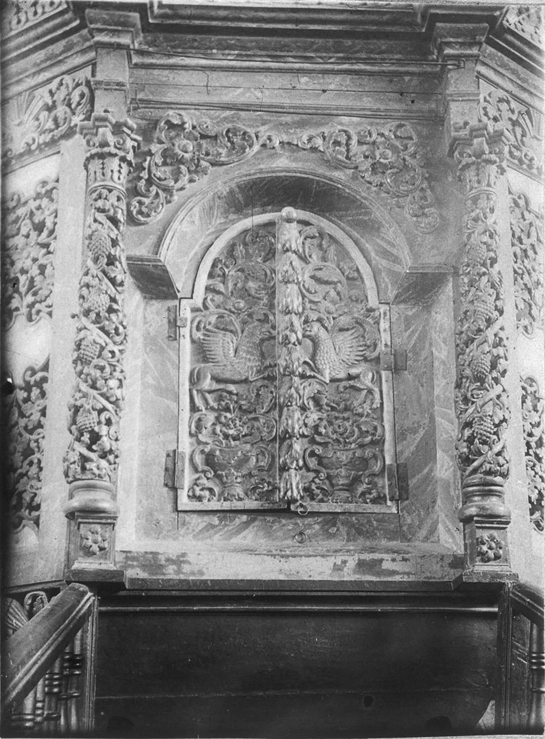 Арон-кодеш в деревянной синагоге в Ярышеве, архивное фото экспедиции П. Жолтовского.